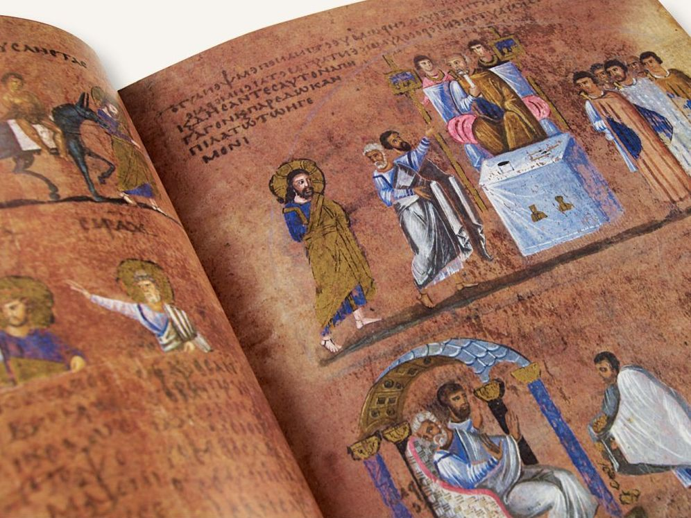 Codex Purpureus Rossanensis